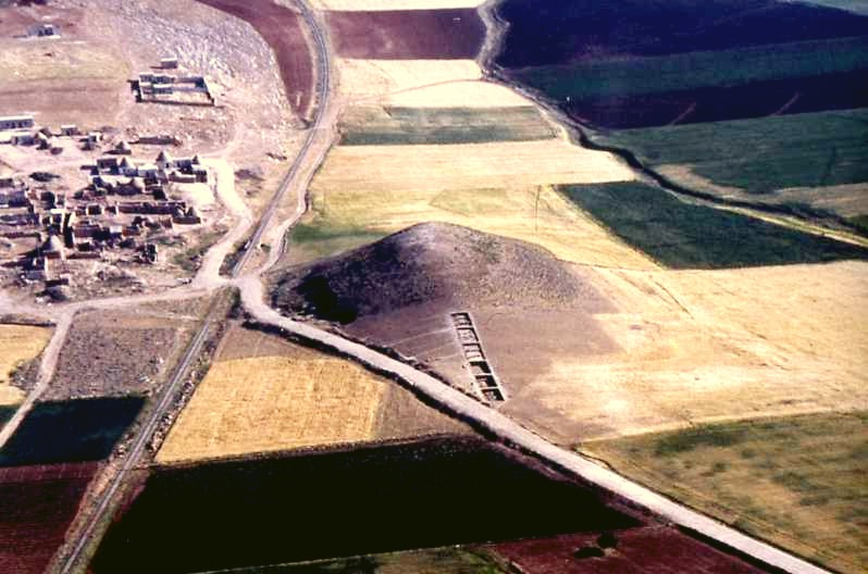 Vue aérienne du site archéologique de Tell Qaramel près d'Alep en Syrie